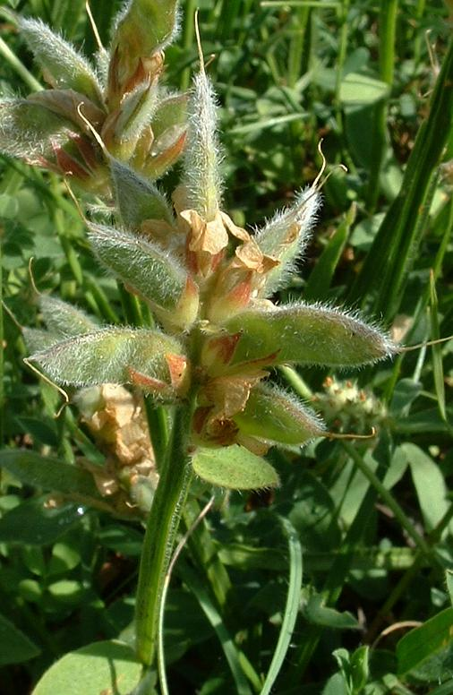 Genet ailé (fruits), Bucey-lès-Gy